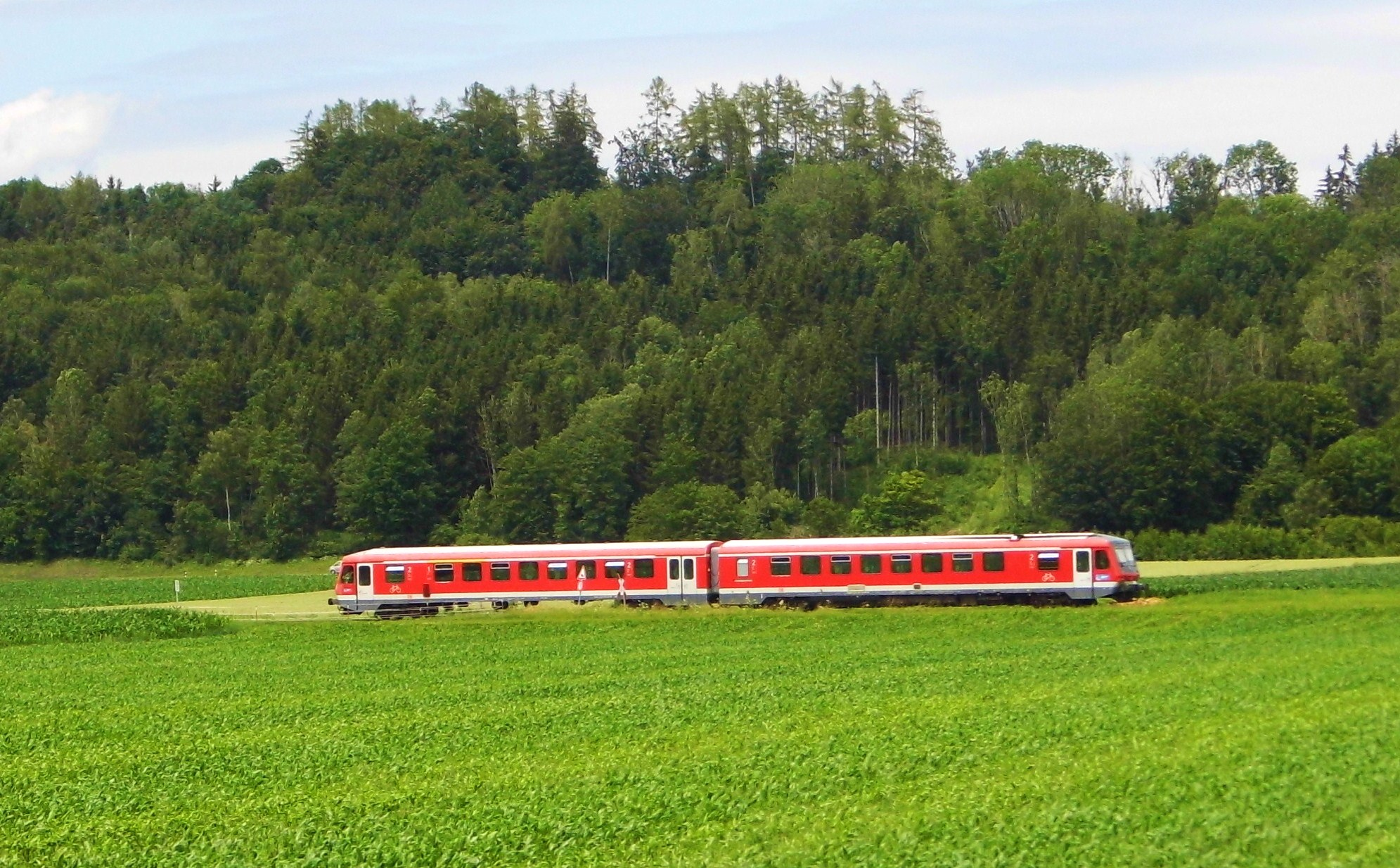 Der "Filzenexpress" fährt Richtung Ebersberg (links), von Steinhöring kommend, kurz vor Neuhausen, am 30.Juni 2020